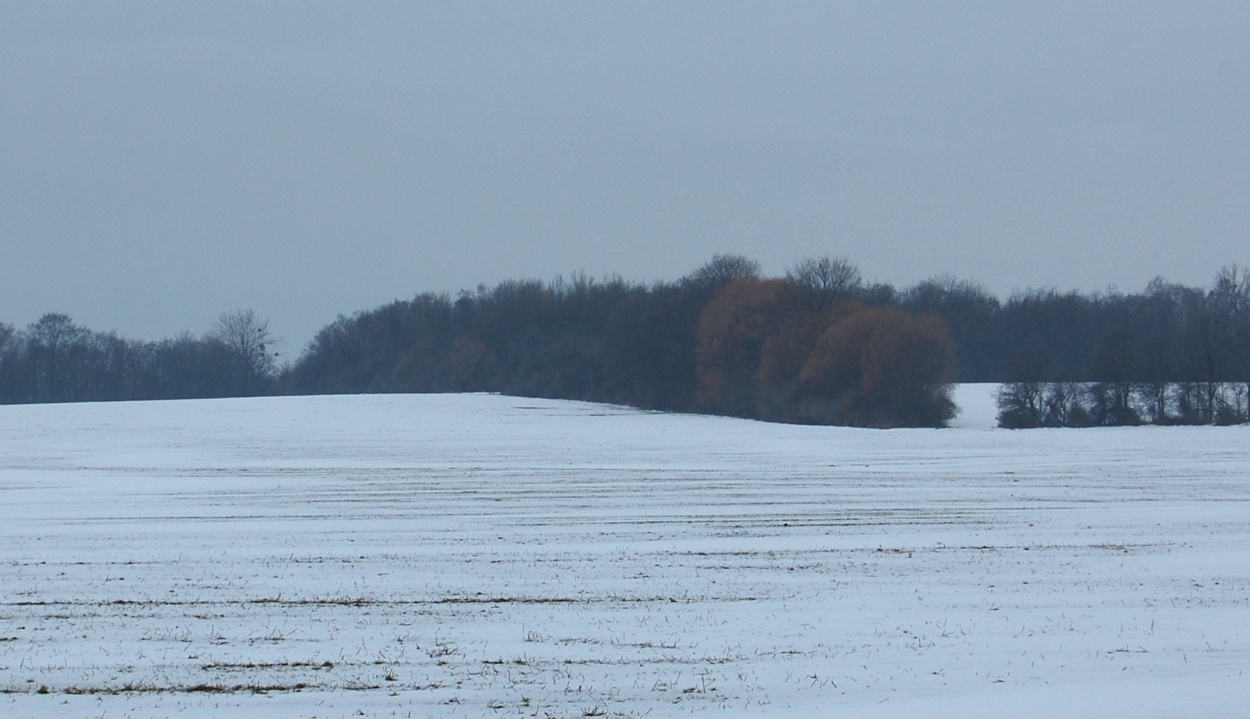 Blick auf das Flurstück Katzendarm, Verlauf des ehemaligen Beyendorfer Weges